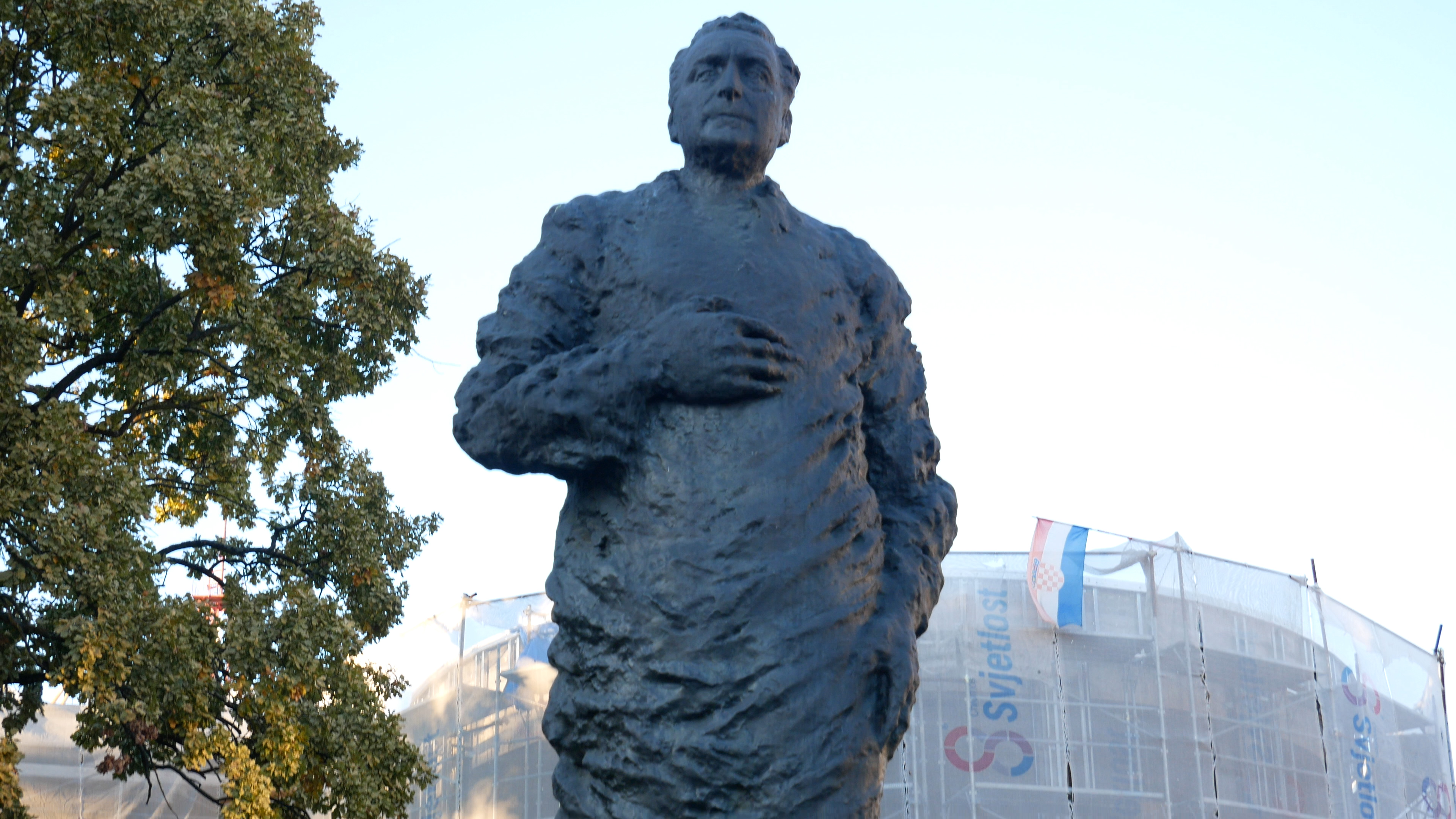 Kip prvog hrvatskog predsjednika u Slavonskom Brodu